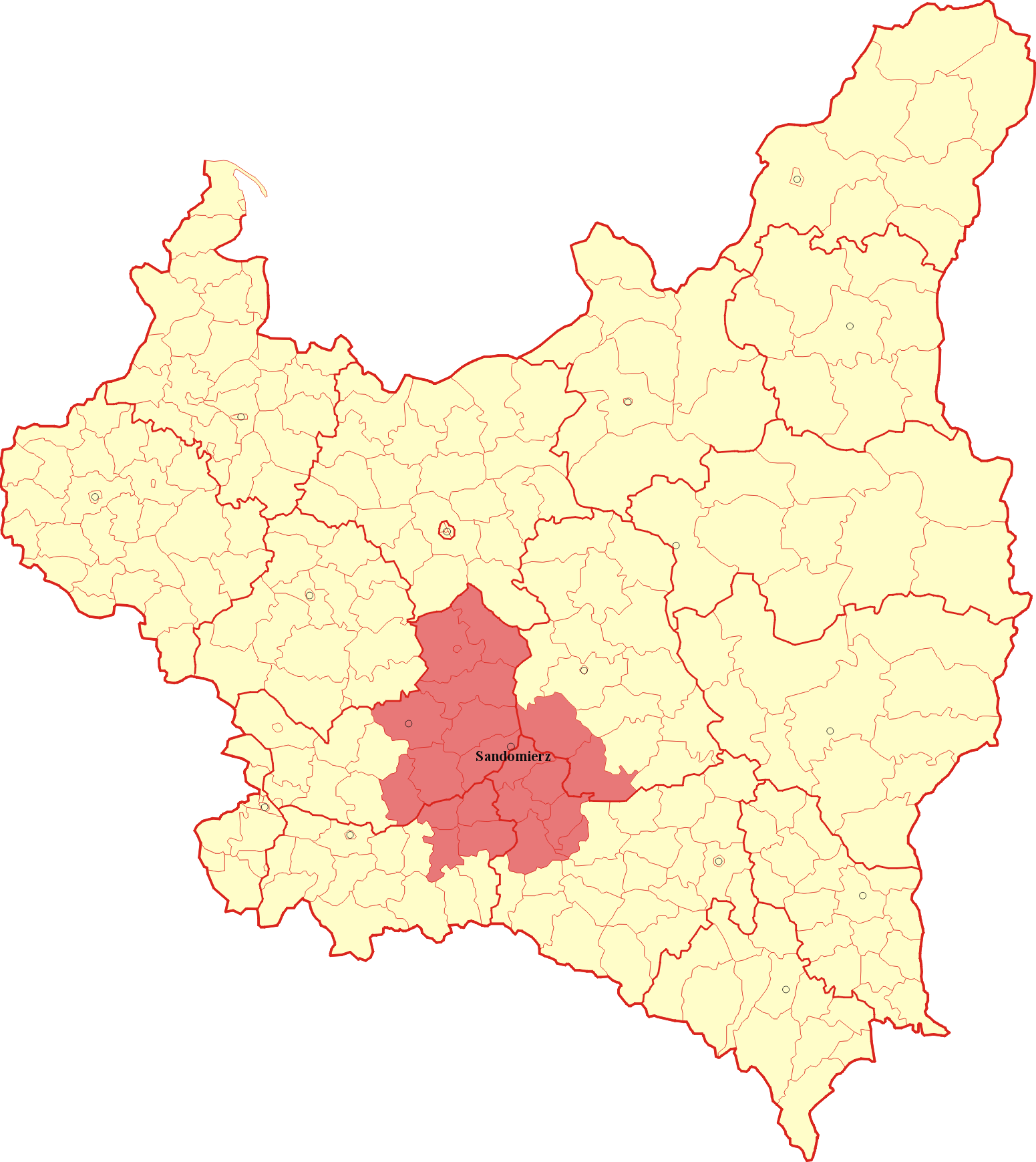 Projektowane województwo sandomierskie na mapie administracyjnej Rzeczypospolitej Polskiej wg. podziału na 01.04.1939 r.